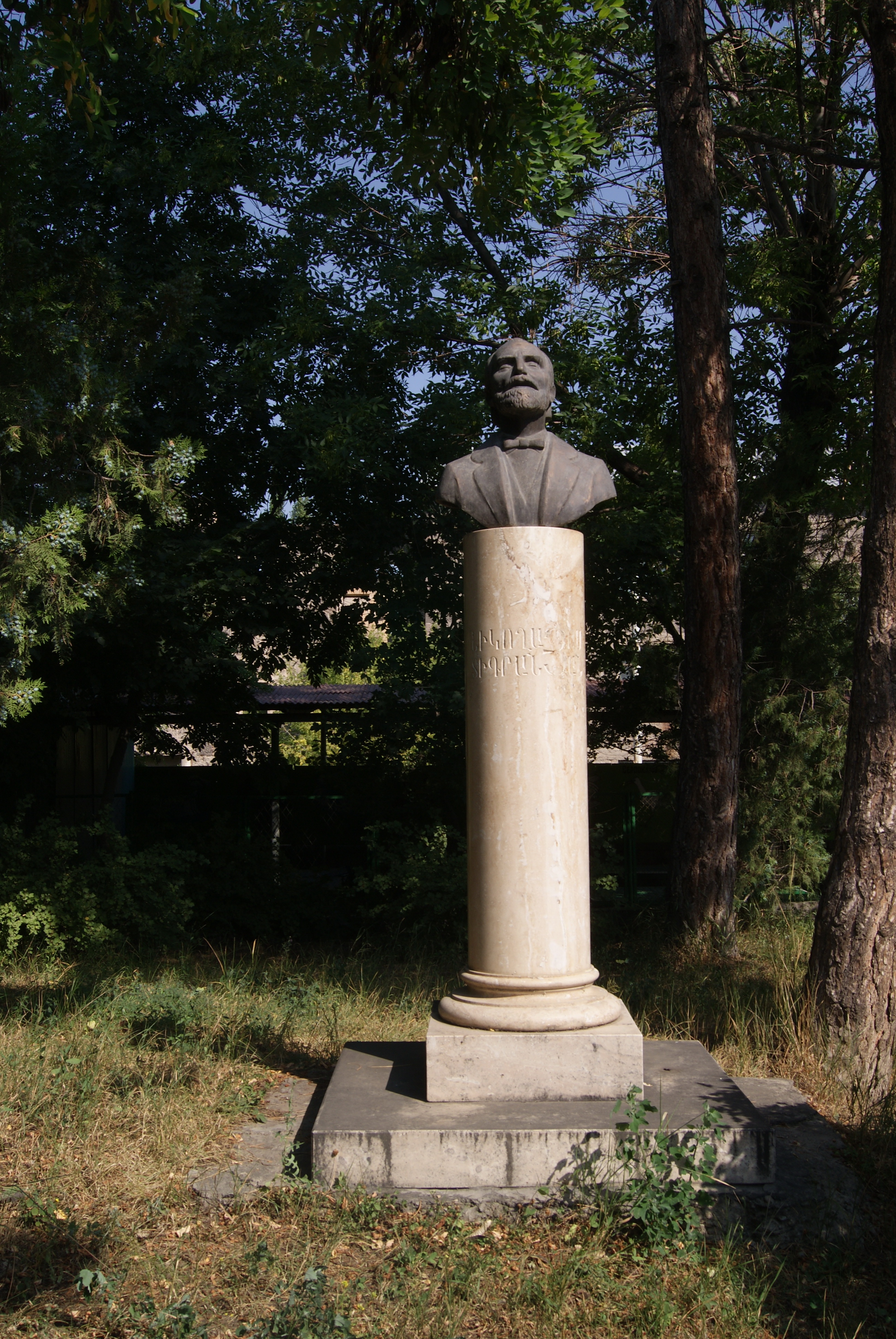 Գյումրու Գորկի զբոսայգի 1/14